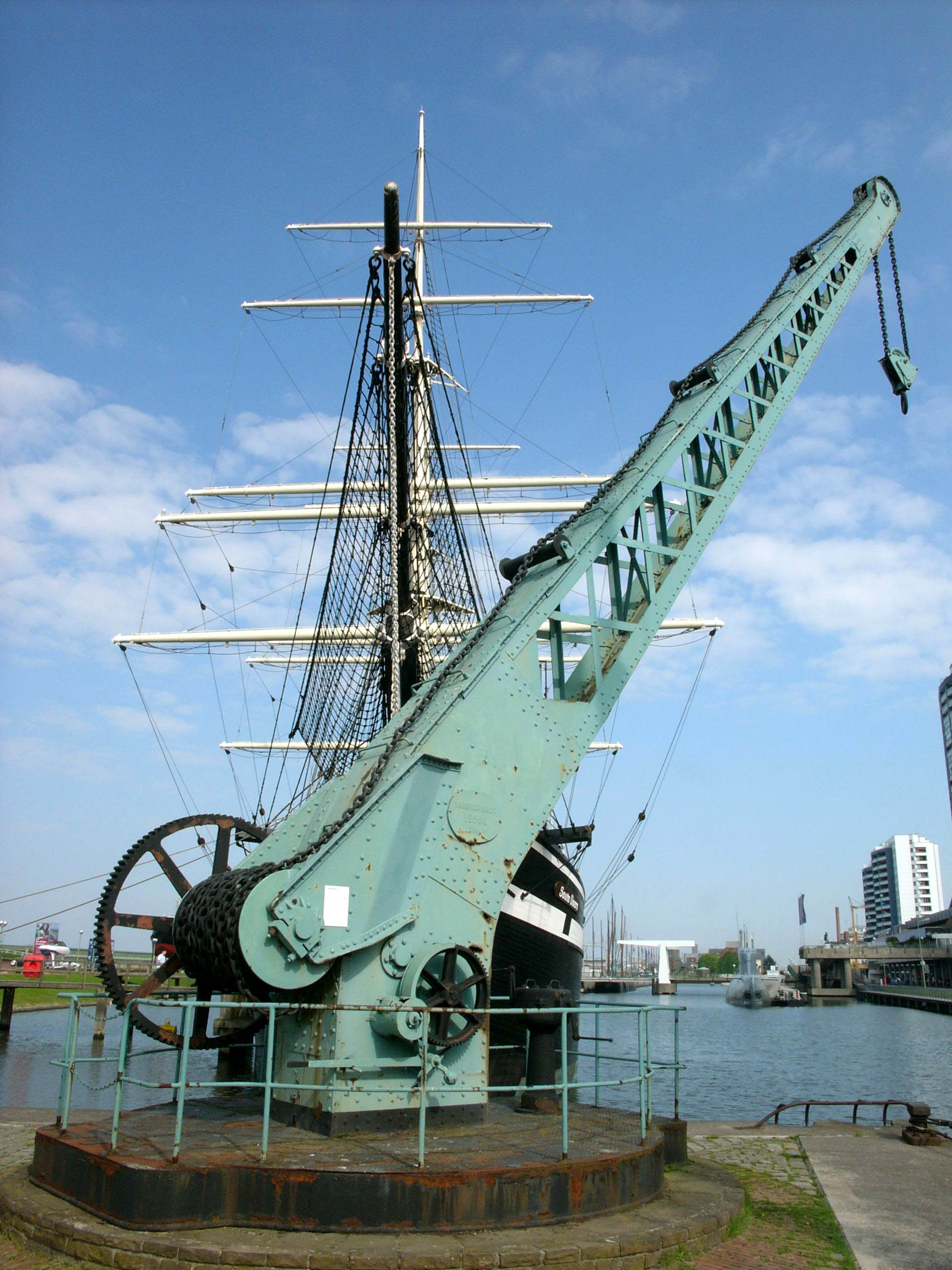 Port crane (Handkurbelkran), Niederschlesische Maschinenfabrik, Görlitz from 1875; Payload 12.5 t; Overhang 18 m; Deutsches Schiffahrtsmuseum, Bremerhaven, Germany